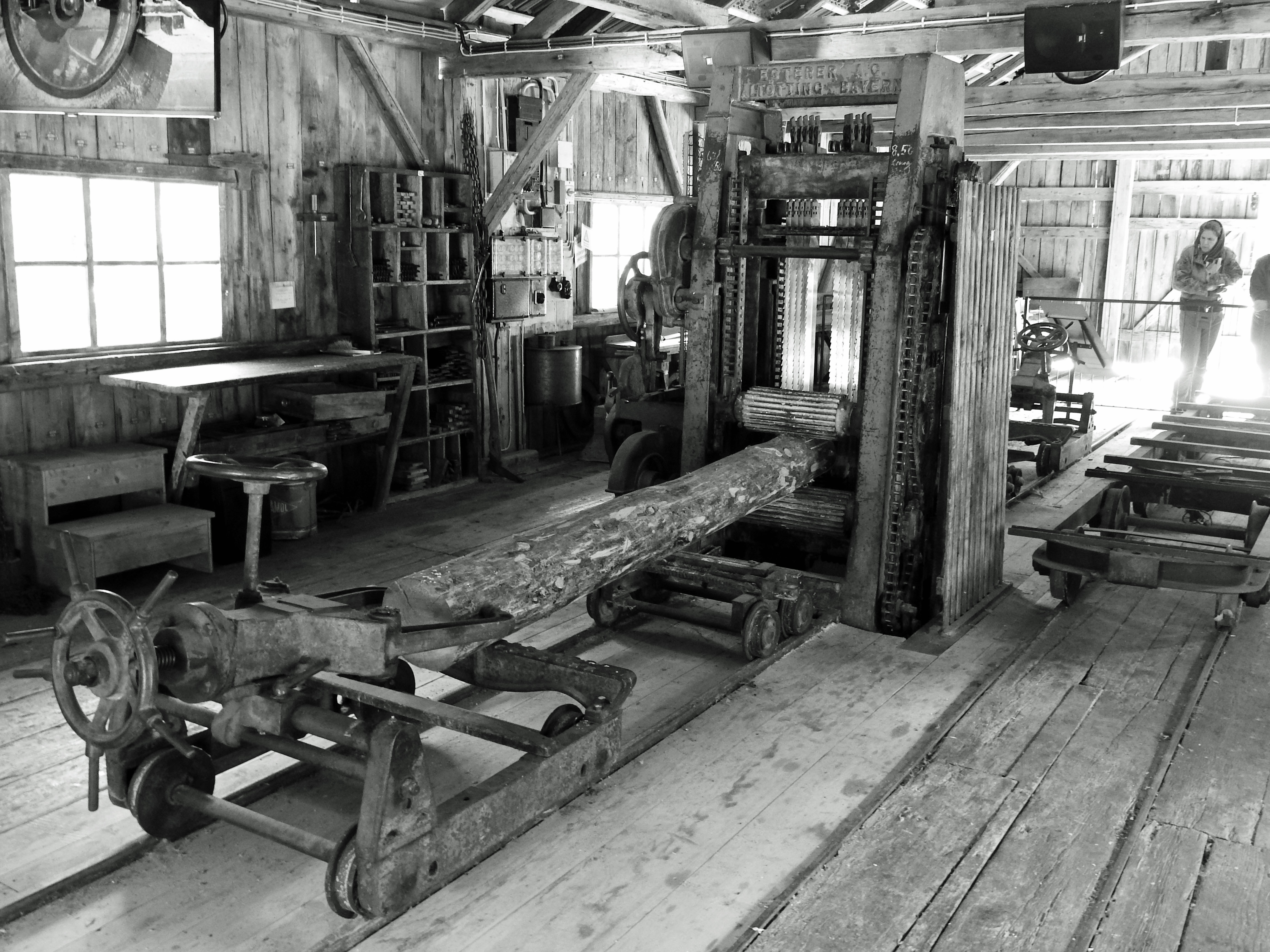 Freilichtmuseum Glentleiten - Sägewerk aus Schönegg, Dietramszell